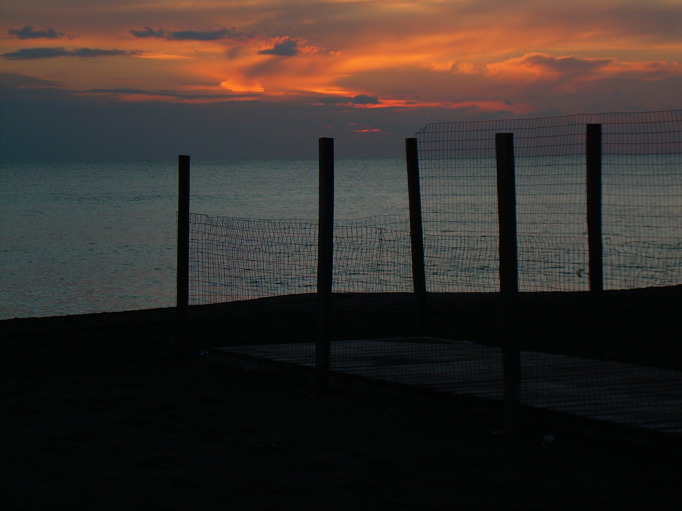 Ladispoli, Rome. Christmas 2006